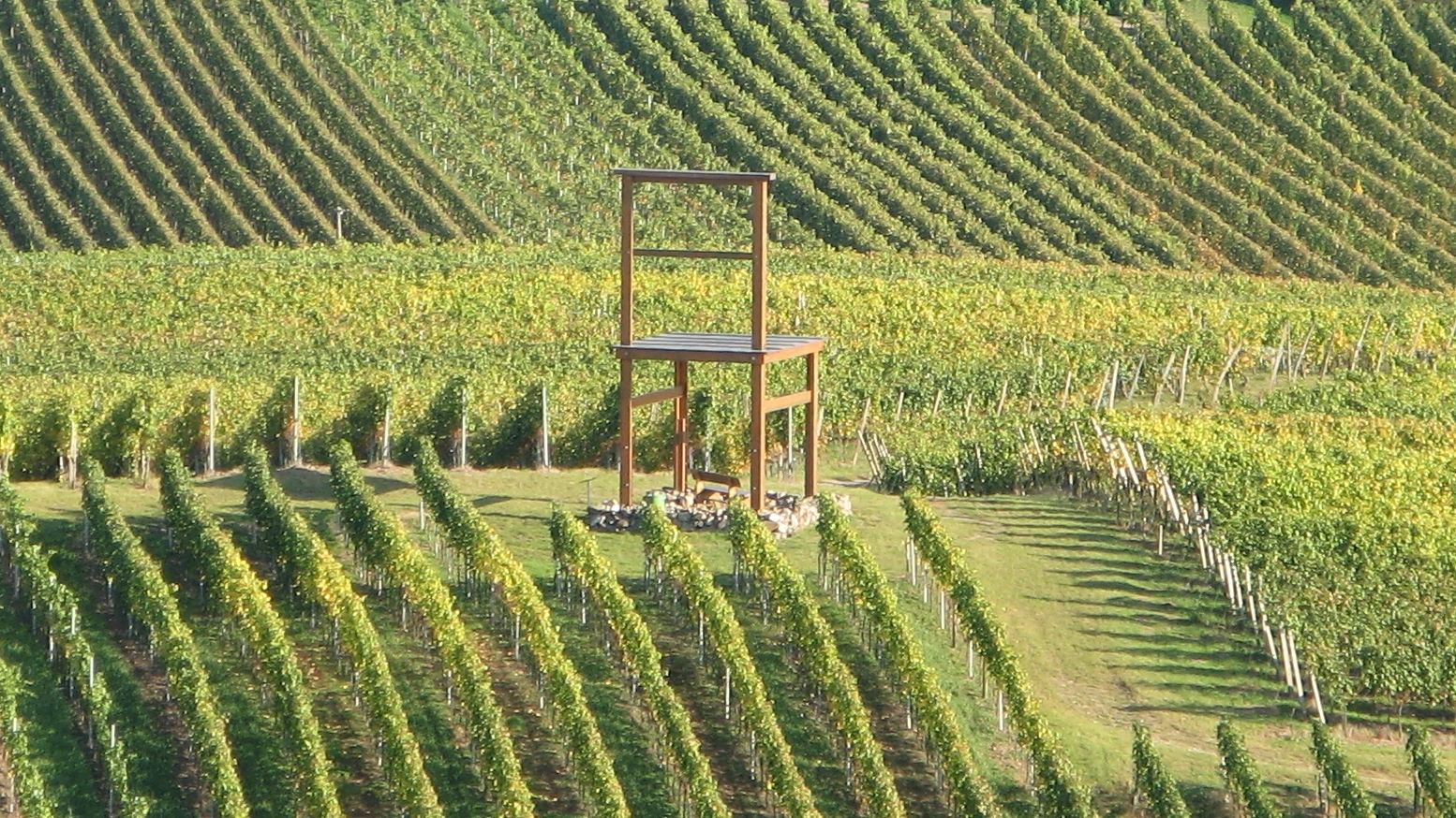 Gestühl Leiselheim im Kaiserstuhl südlich Leiselheims gesehen vom Hochberg.